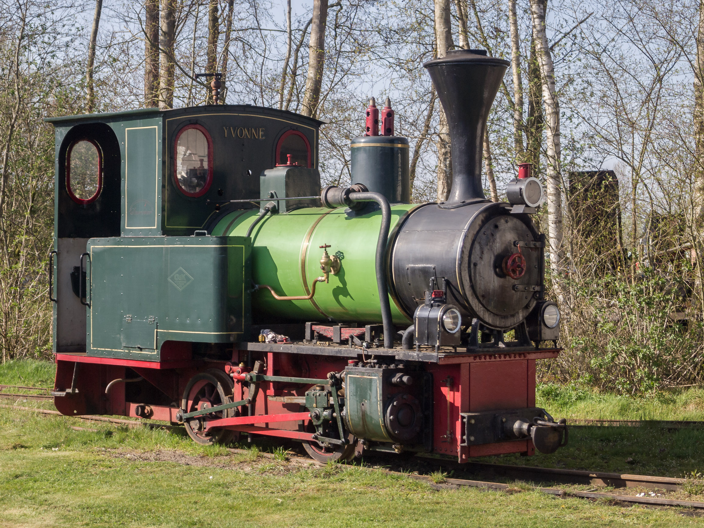 O&K locomotief in het veenpark Barger-Compascuum